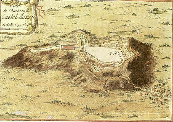 Antic castell de CASTELL DASENS